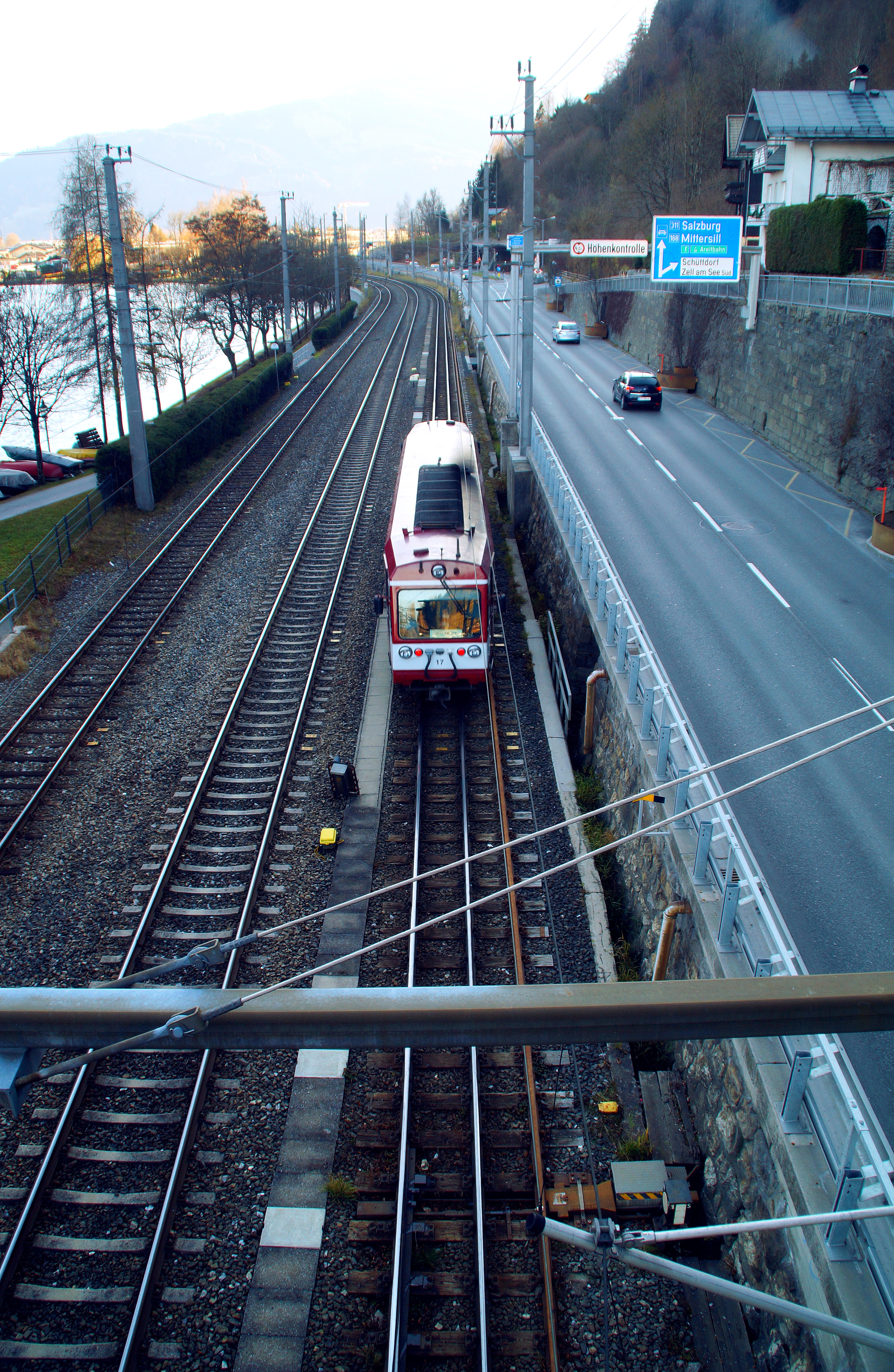 Gemeinsame Bahnanlage der Salzburg-Tiroler-Bahn und der Pinzgauer Lokalbahn zwischen Zell am See und Schüttdorf, Salzburg, Österreich. Rechts das Dreischienengleis für die Nomalspur- und Schmalspurbahn.